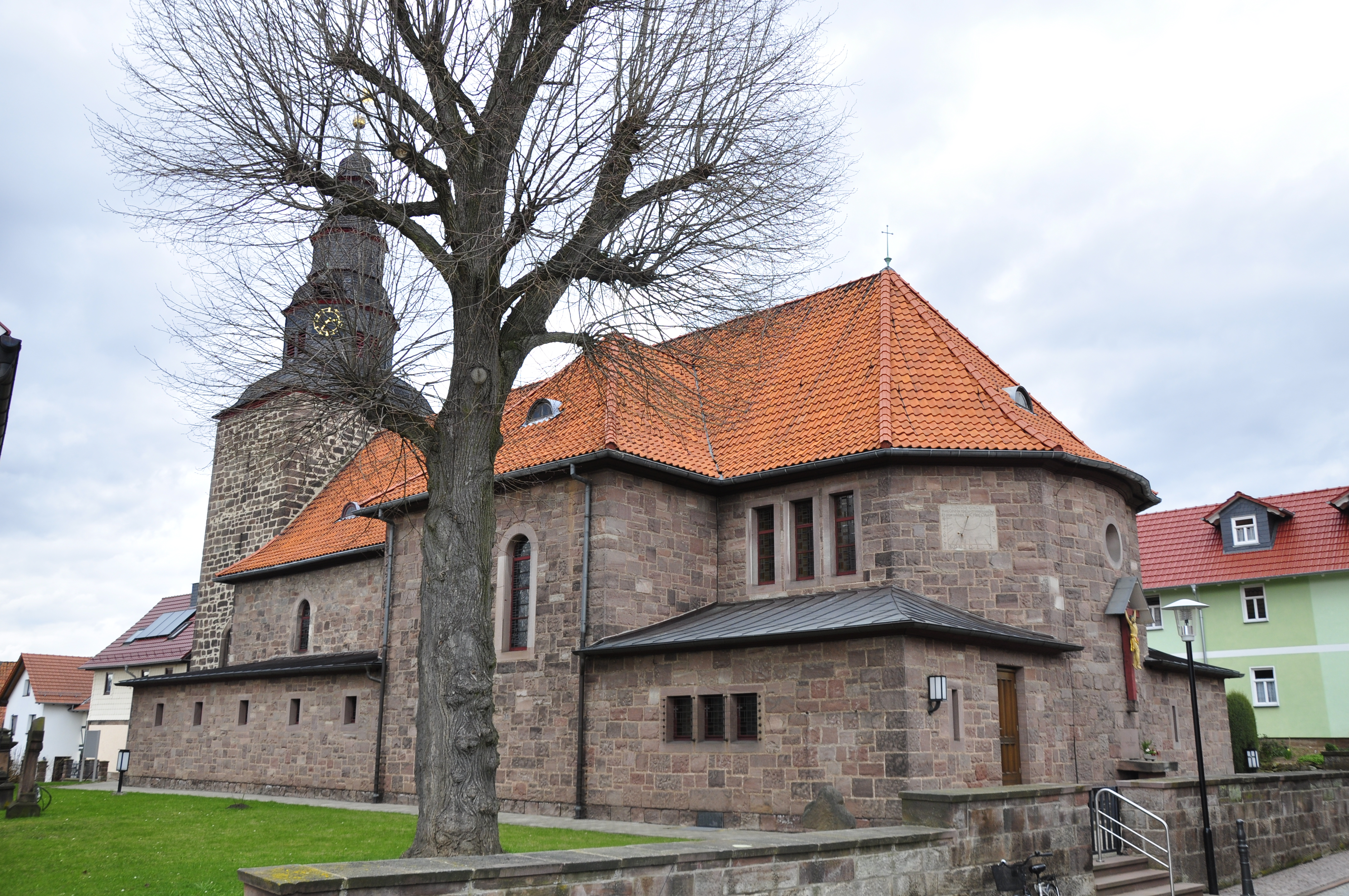 Thüringen